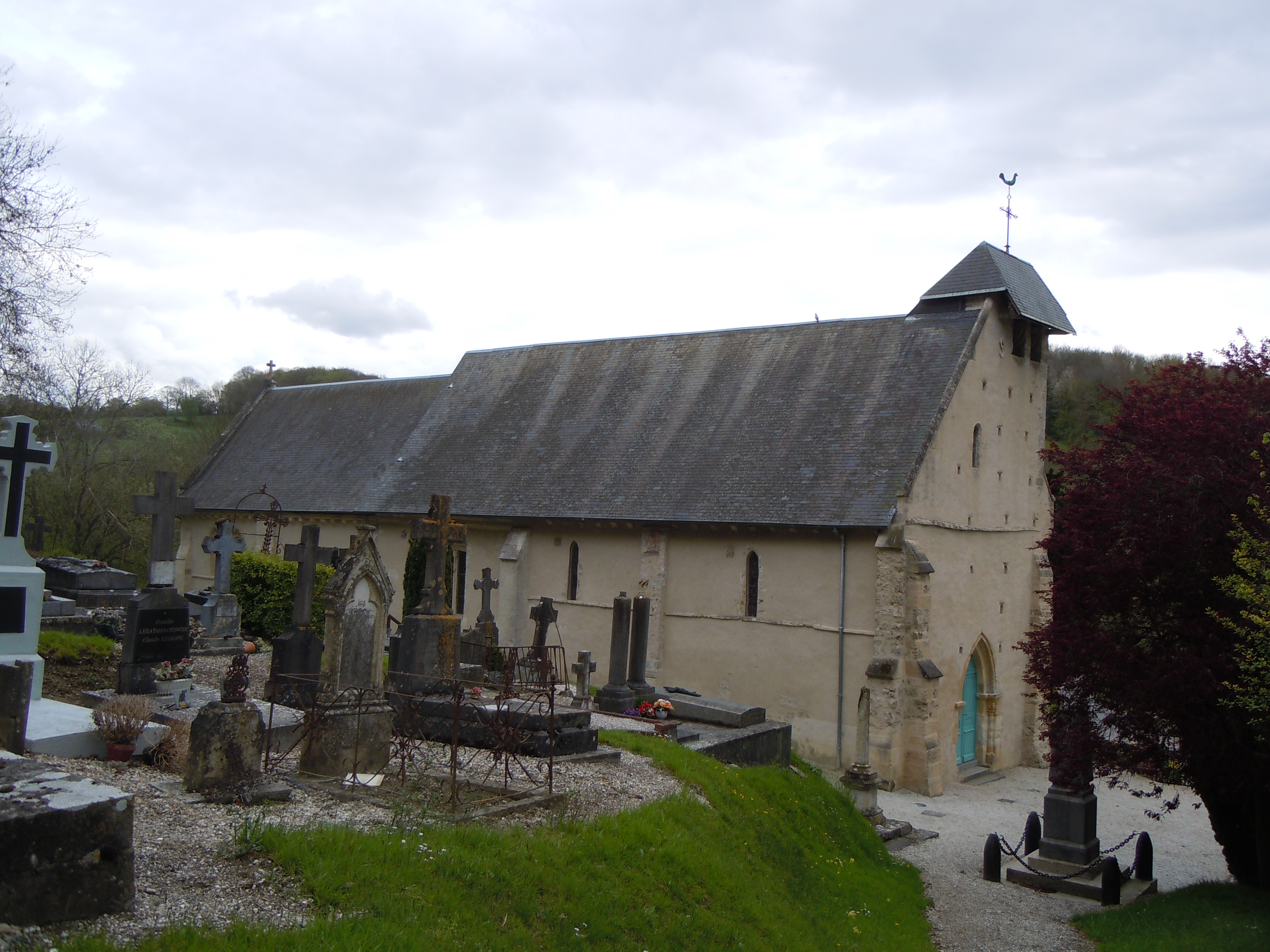 Grangues (Normandie, France). L'église Notre-Dame depuis le haut du cimetière.